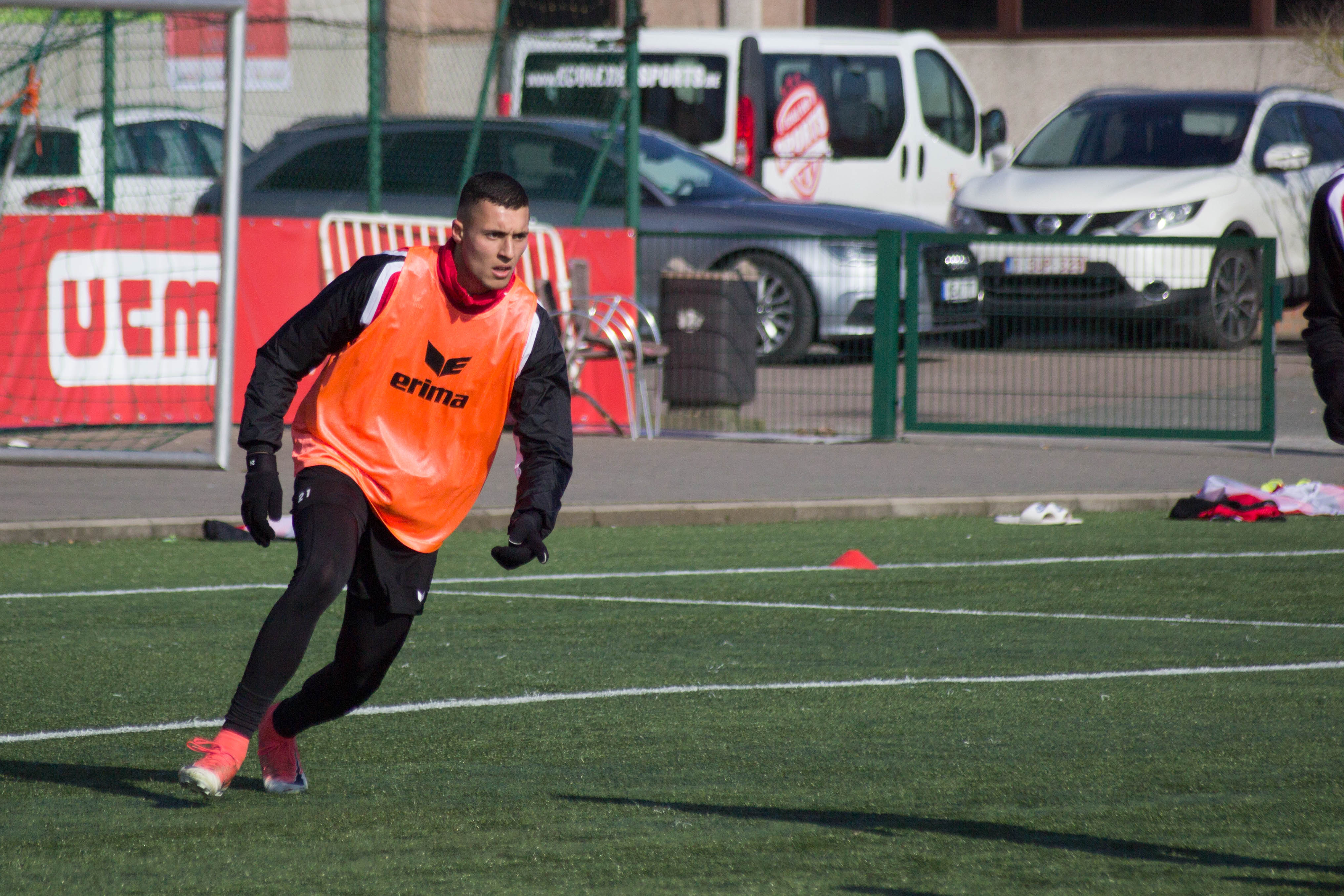 Entraînement du Royal Excel Mouscron, au Futurosport( Mouscron). Le 22 février 2018.